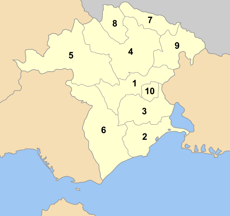 Map of Xanthi prefecture (Greece) with administrative divisions (municipalities and communities) numbered in alphabetical order (in greek). Legend: 1. Δήμος Ξάνθης - Xanthi 2. Δήμος Αβδήρων - Avdira 3. Δήμος Βιστωνίδας - Vistonida 4. Δήμος Μύκης - Myki 5. Δήμος Σταυρούπολης - Stavroupoli 6. Δήμος Τοπείρου - Topiros 7. Κοινότητα Θερμών - Thermes 8. Κοινότητα Κοτύλης - Kotyli 9. Κοινότητα Σατρών - Satres 10. Κοινότητα Σελέρου - Selero